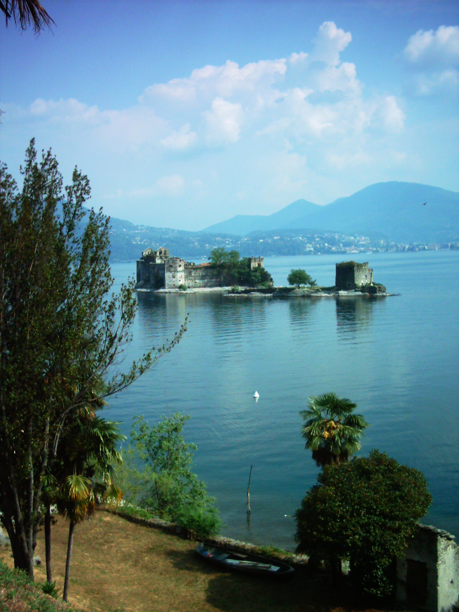 Resti castello di Cannero Riviera